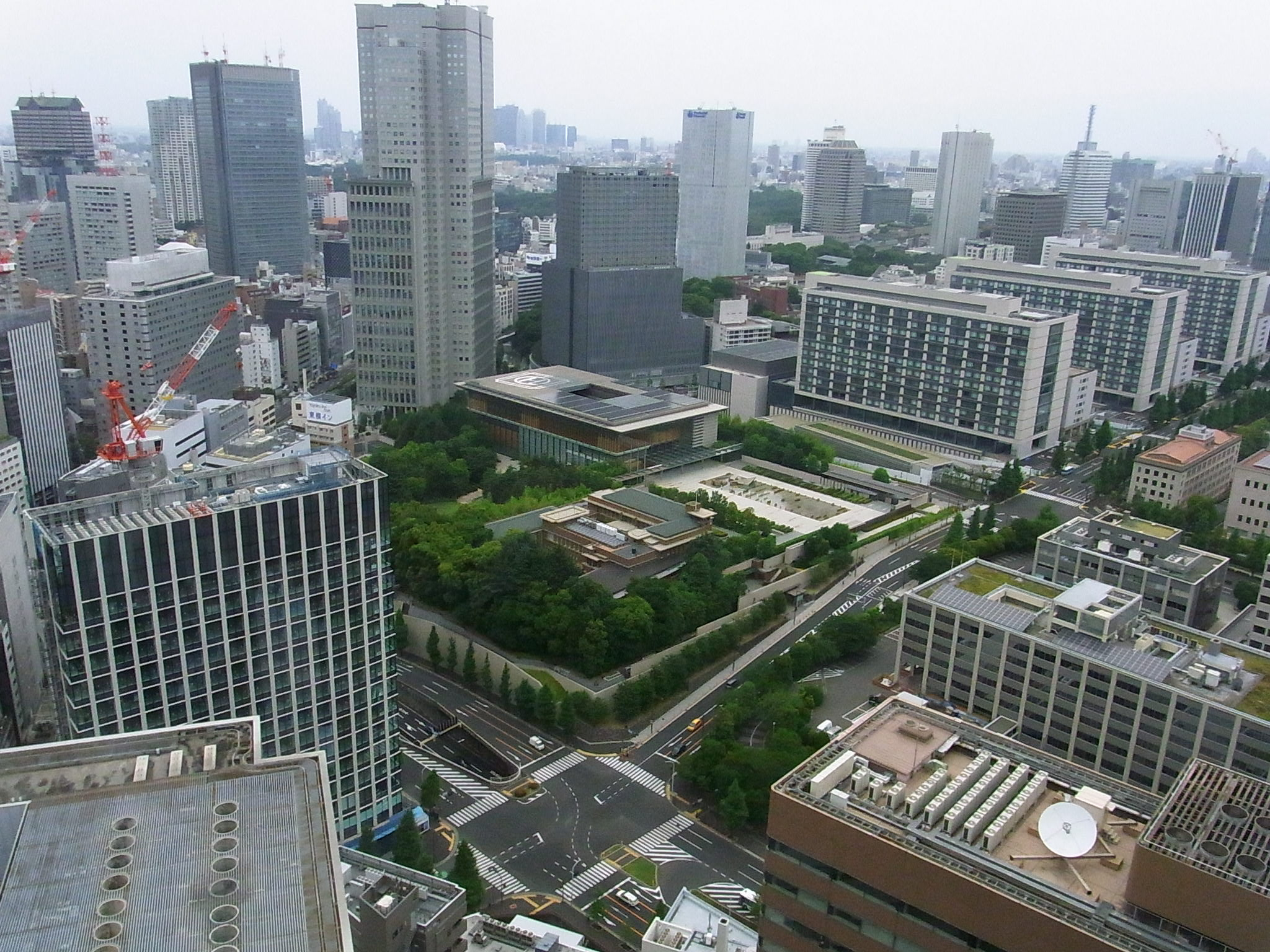 霞ヶ関ビル